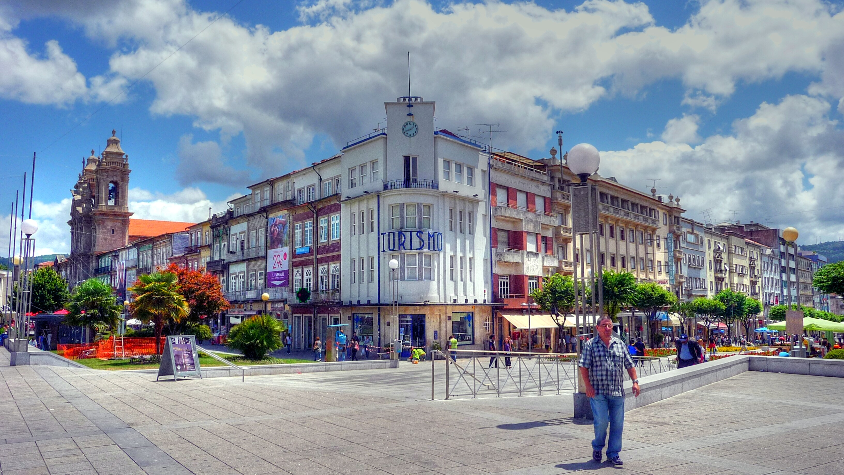 Avenida Central de Braga.